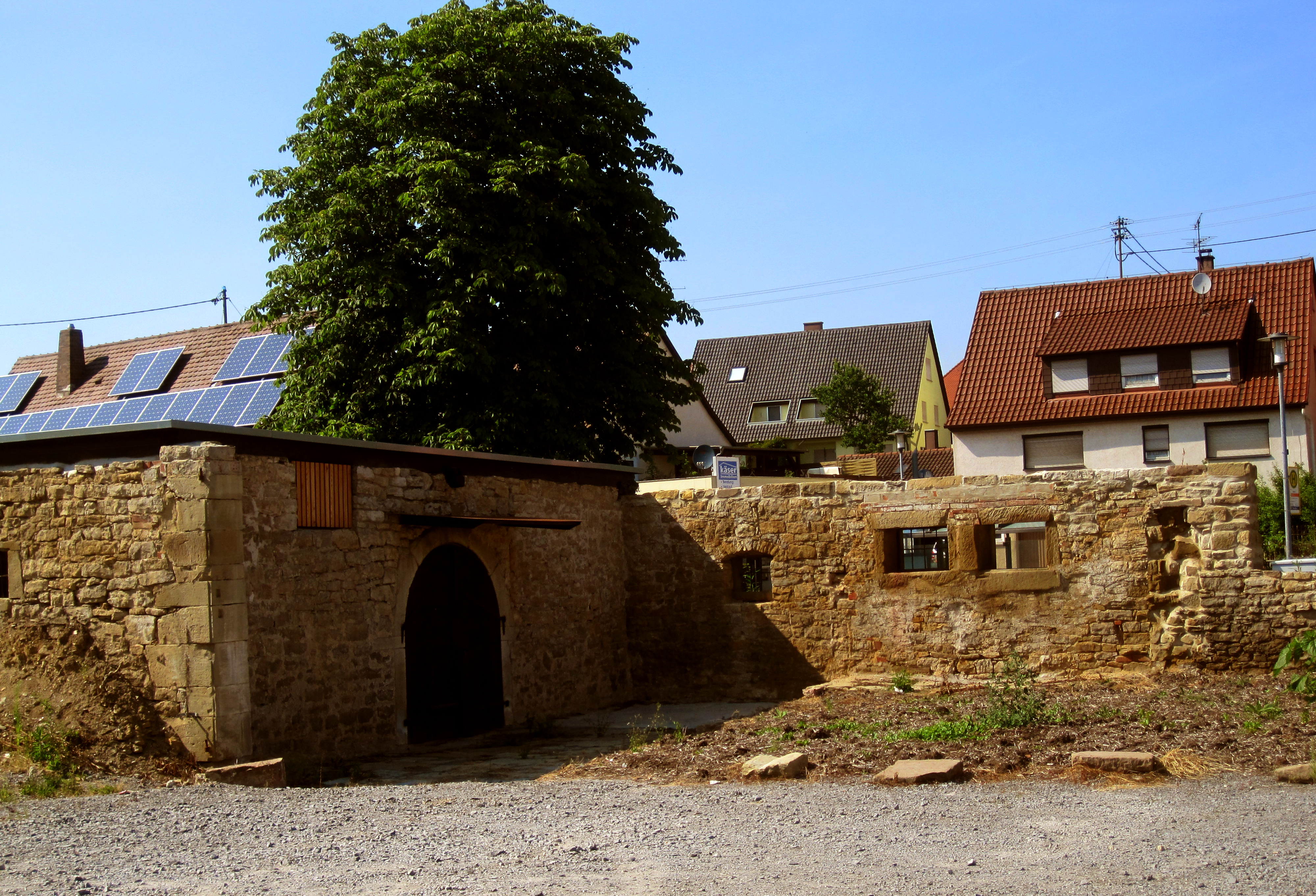 ehem. Keller des Gasthauses Krone auf dem "Sonnenareal", erbaut spätestens Anfang 17. Jh.